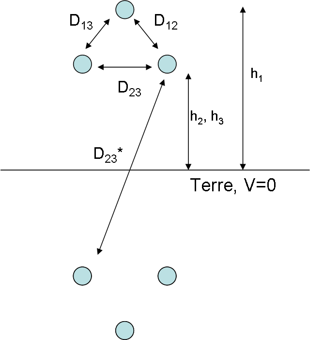 Schéma illustrant le calcul du potentiel des lignes triphasées dans le cas d'une application de la méthode des miroirs